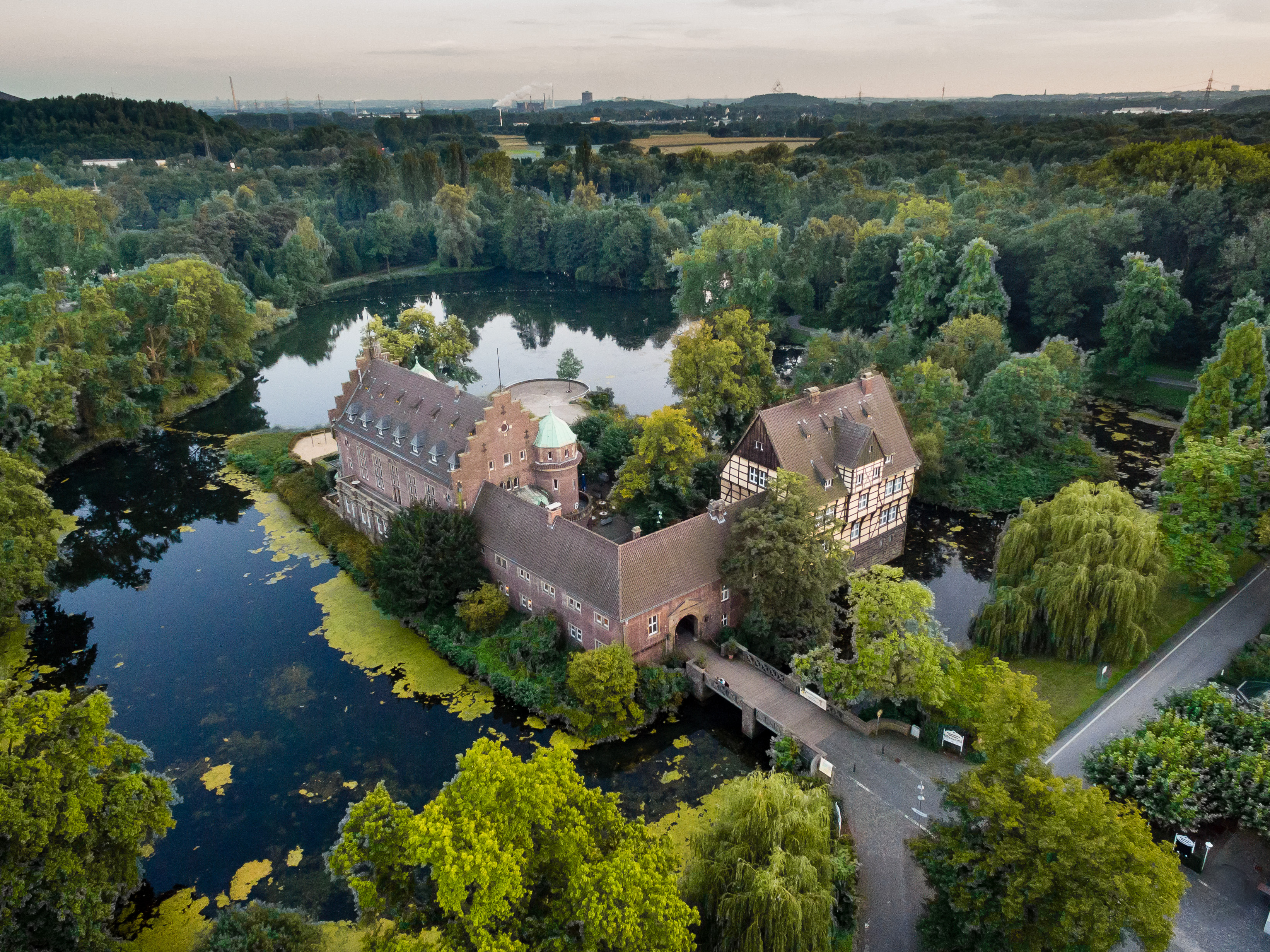 Luftaufnahme des Wasserschlosses Wittringen in der Stadt Gladbeck. This is a photograph of an architectural monument.